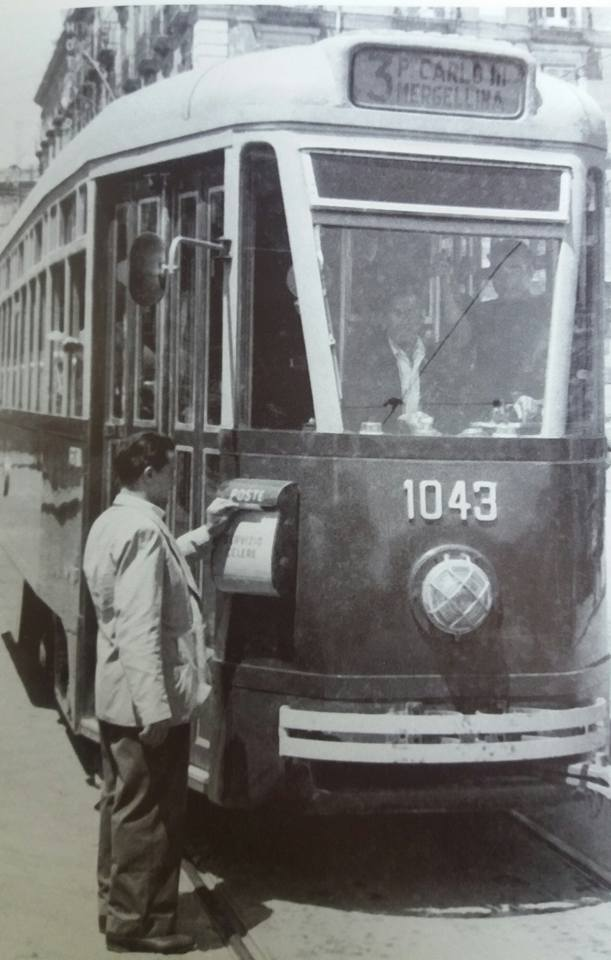 Napoli - Servizio postale celere tramite tram. Autore sconosciuto.